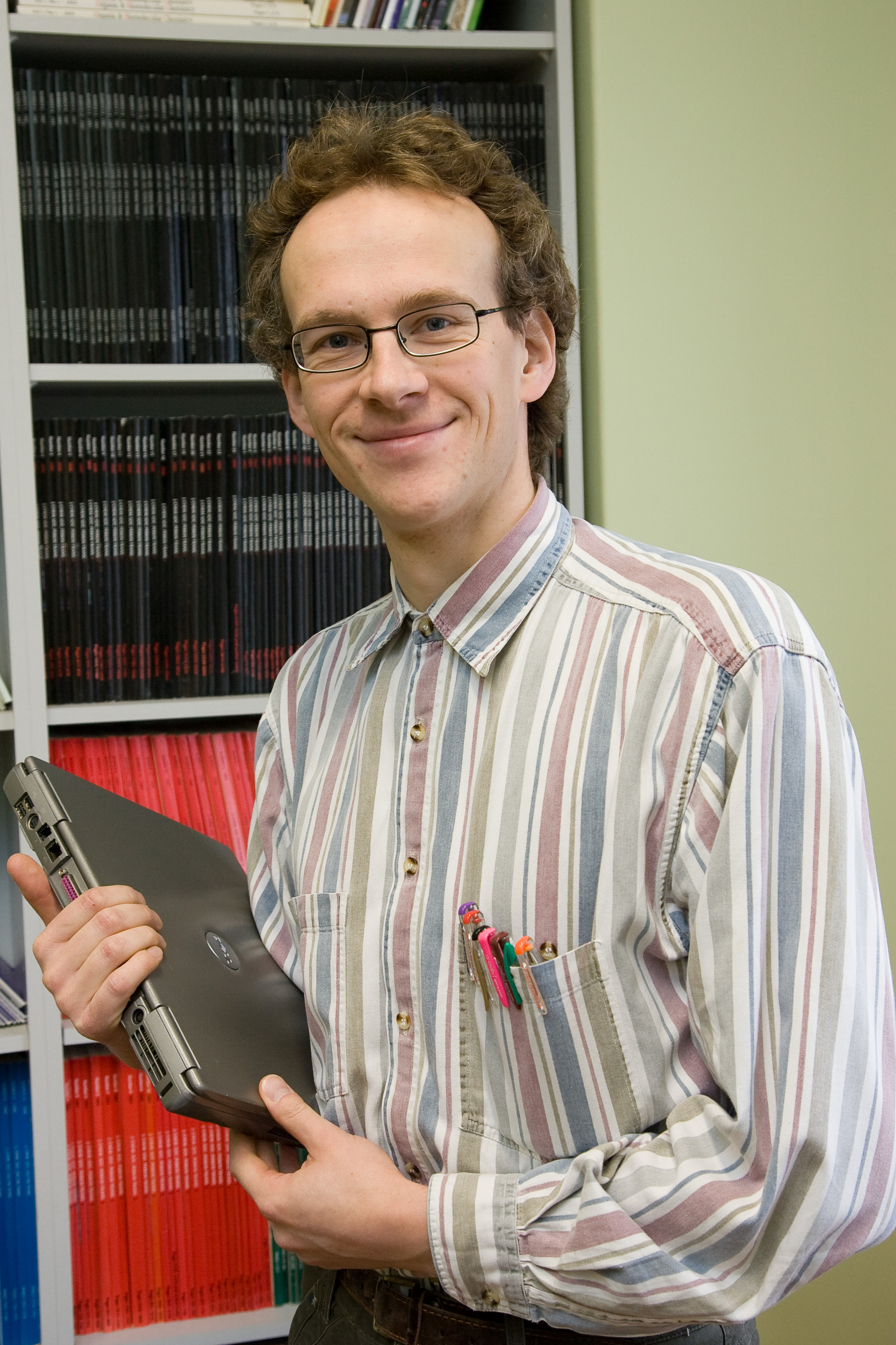 Tartu Ülikooli Keemia Instituudi analüütilise keemia õppetooli juhataja, analüütilise keemia professor Ivo Leito.